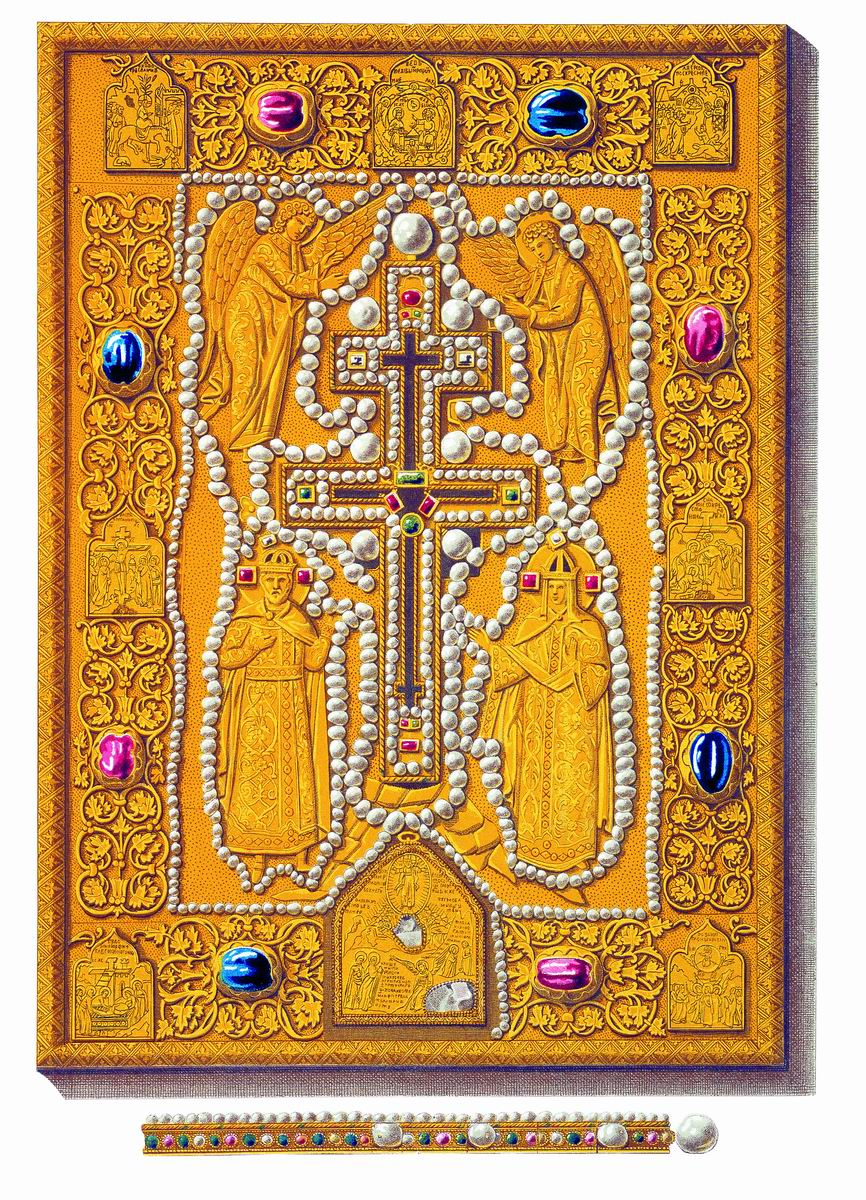 Дорогоцінний оклад наперсного Хреста Мономахова. Малюнок XIX ст.